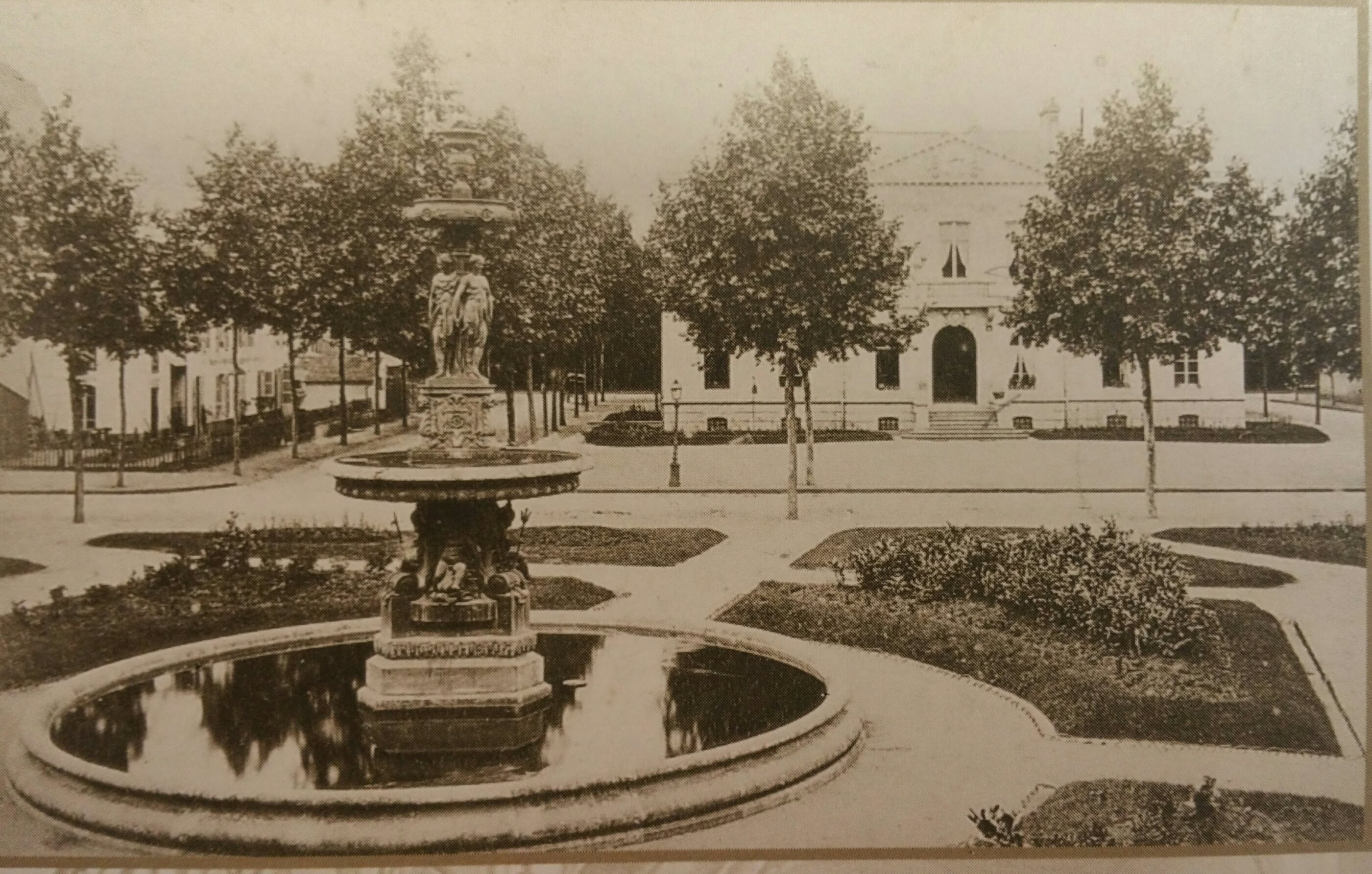 Ancienne place du Fatitot (aujourd'hui partie du square du Maréchal Leclerc) à Vichy. En arrière plan, l'ancienne mairie de Vichy détruite en 1910 pour laisser la place à l'hôtel Ruhl, devenue hôtel Radio puis résidence privée sous le nom du Palais des Parcs.